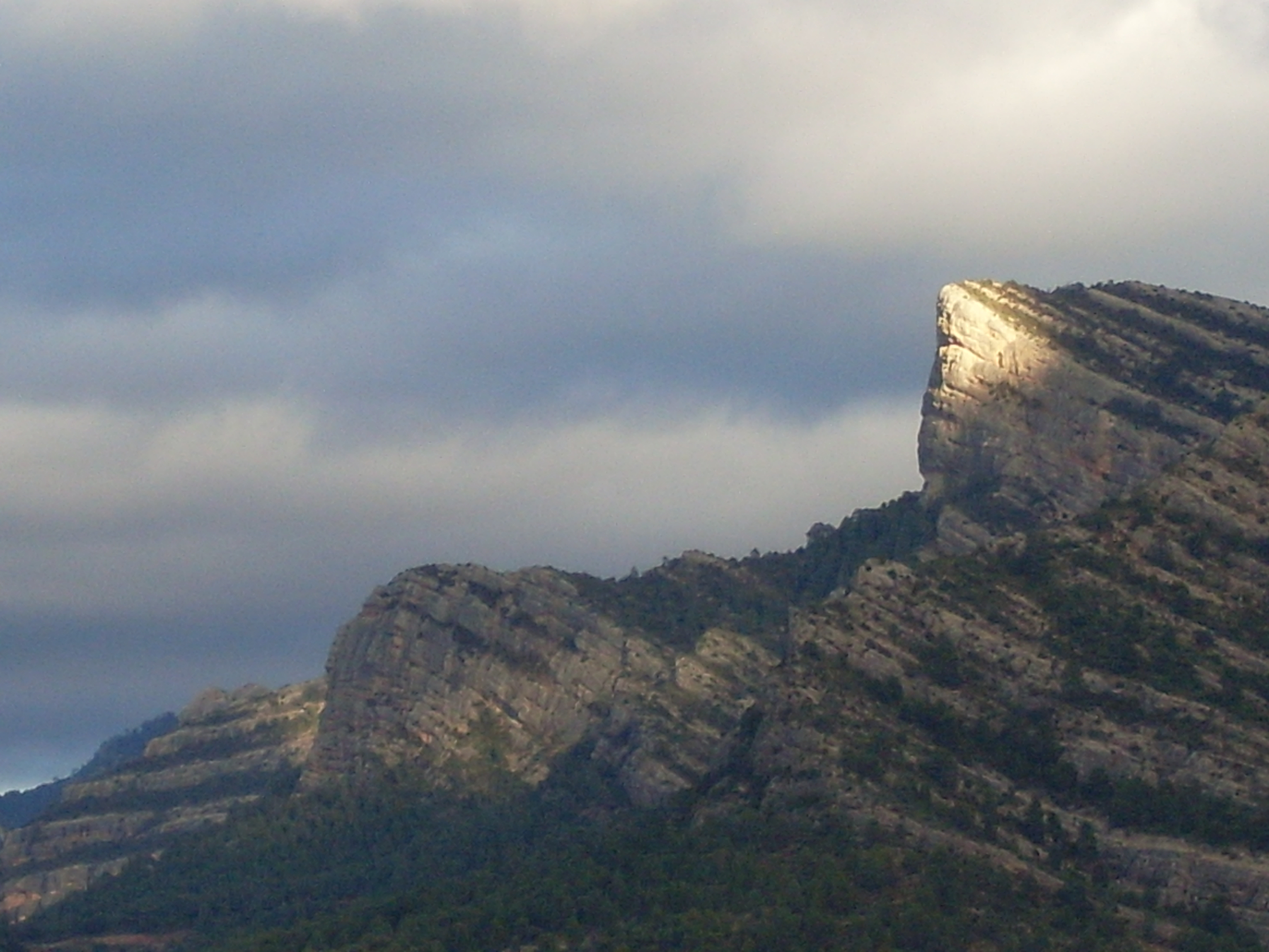 Peña galera This is a photography of a Special Area of Conservation in Spain with the ID: ES2420036. Natura2000 entry, EEA entry